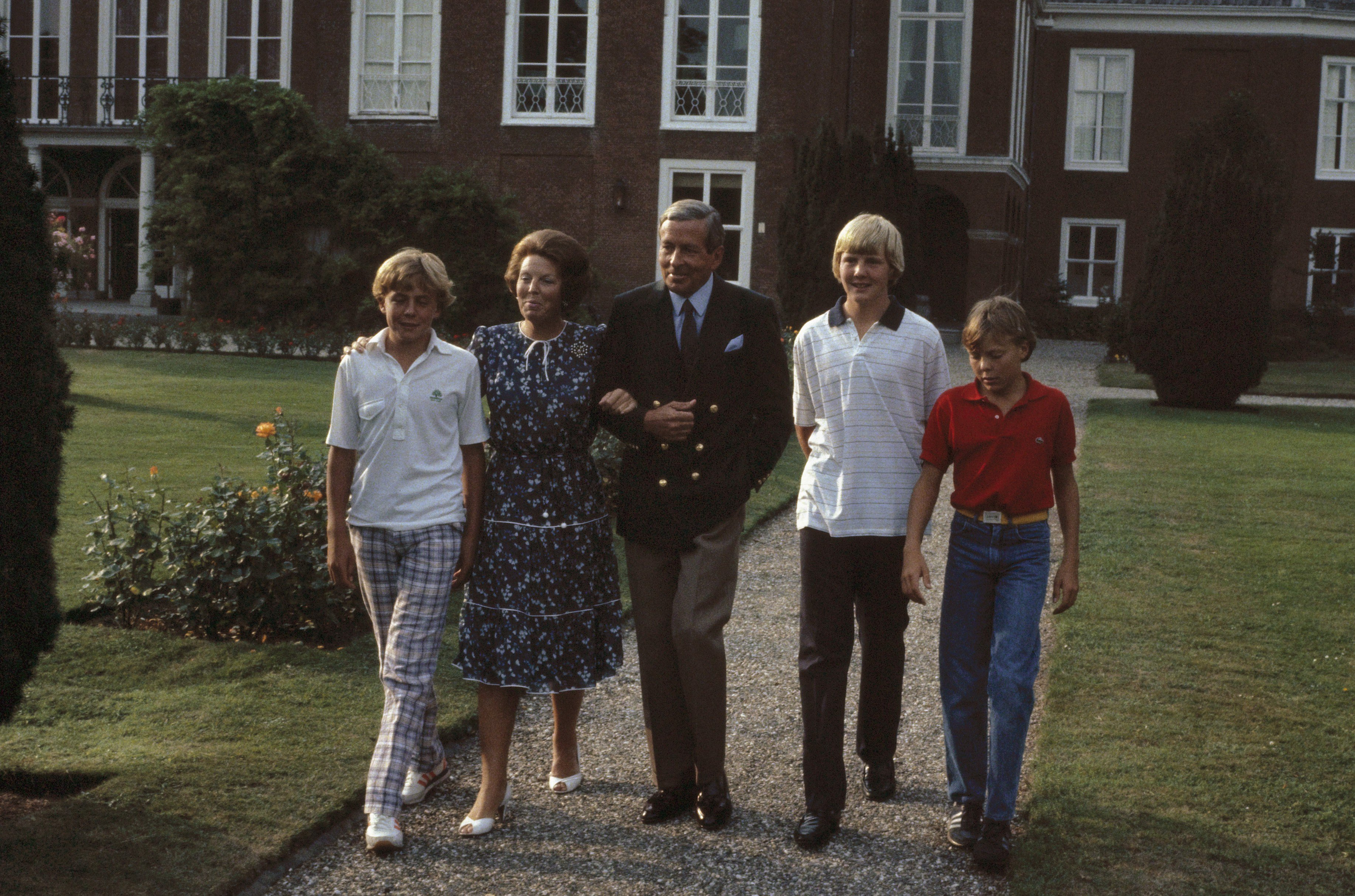 Collectie / Archief : Fotocollectie Anefo Reportage / Serie : [ onbekend ] Beschrijving : Foto uurtje Koninklijke Familie op Huis ten Bosch (iets achterbelicht) Datum : 25 augustus 1983 Trefwoorden : Koninklijke familie Instellingsnaam : Huis Ten Bosch Fotograaf : Croes, Rob C. / Anefo Auteursrechthebbende : Nationaal Archief Materiaalsoort : Dia (kleur) Nummer archiefinventaris : bekijk toegang 2.24.01.06 Bestanddeelnummer : 253-8804